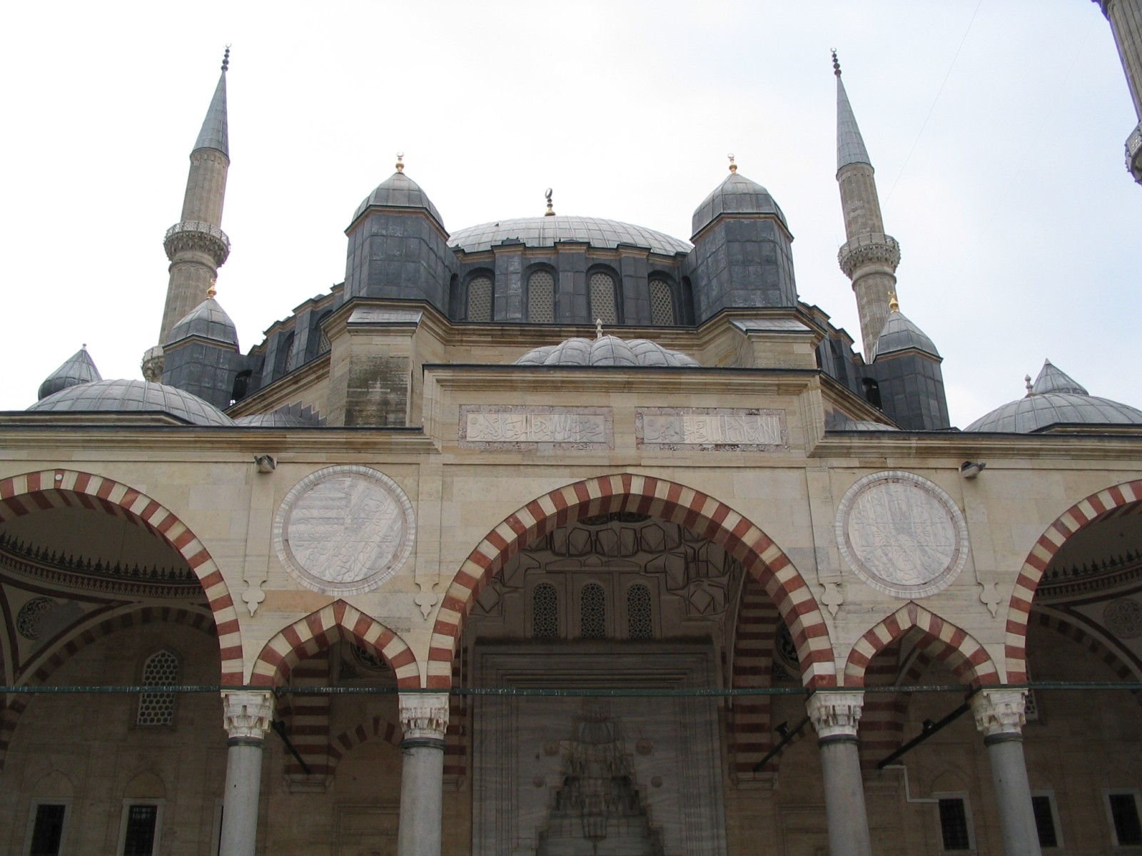 Selimiye Mosque, Edirne